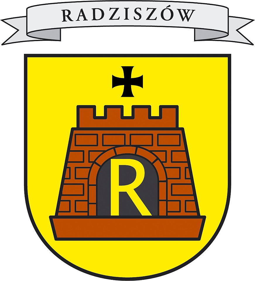 Herb Radziszowa